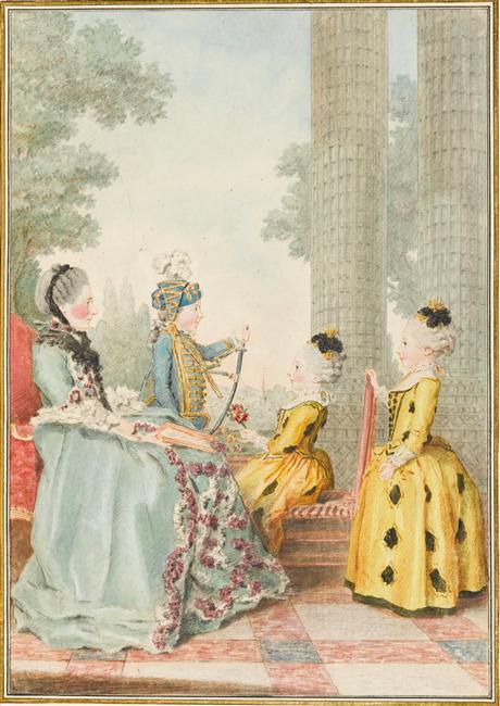 Madame de Montullé, née Élisabeth Haudry, et ses enfants